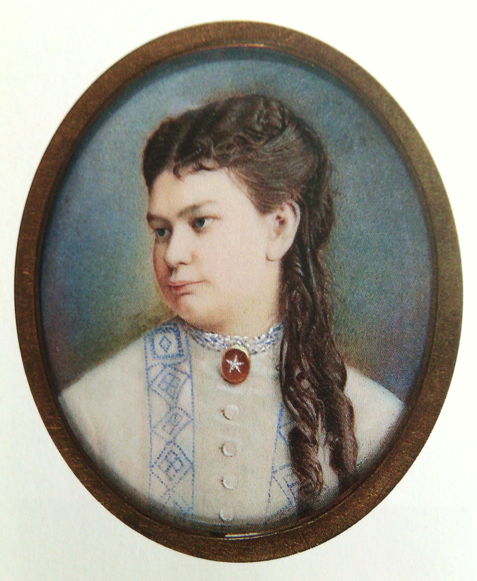 Александра Владимировна Шварц (1848—1926), c 1874 года замужем за Владимиром Степановичем Адамовым (ум. 1877). Овдовев, в 1878 году вторично вышла замуж за Евгения Григорьевича Шварца (1843—1932), своего дальнего родственника.